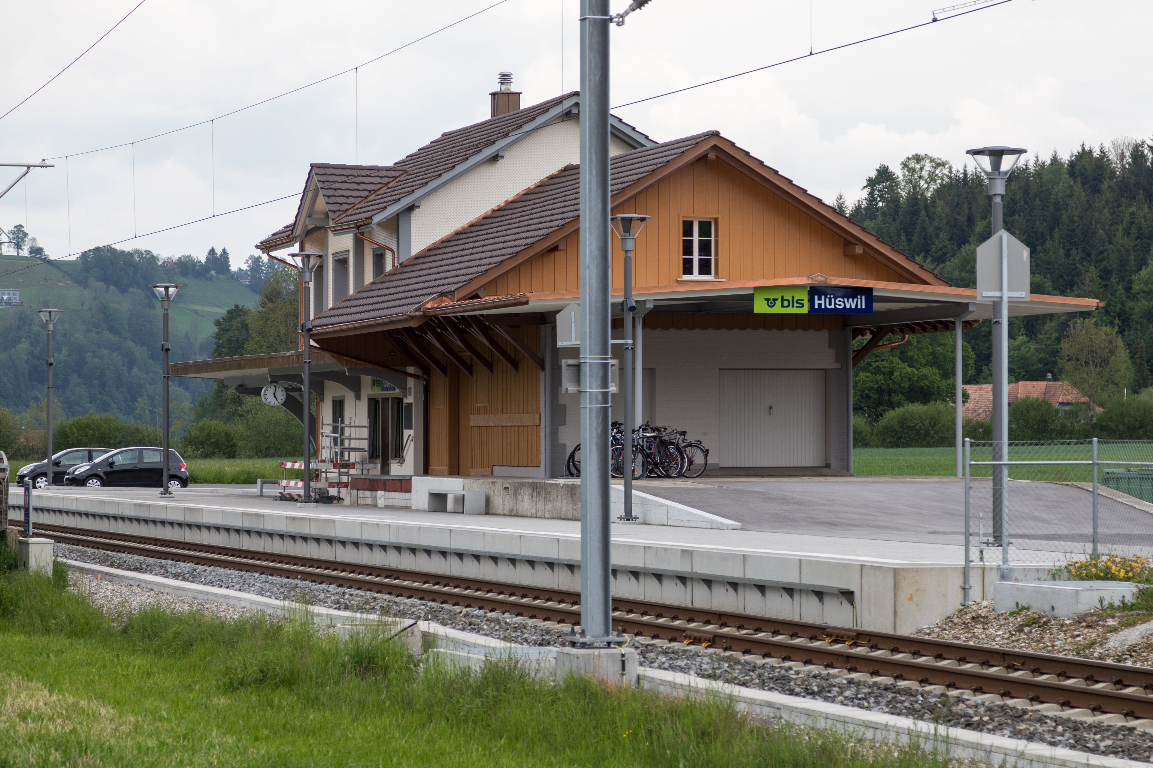 BLS-Bahnhof Hüswil an der Strecke Luzern-Huttwil-Langenthal